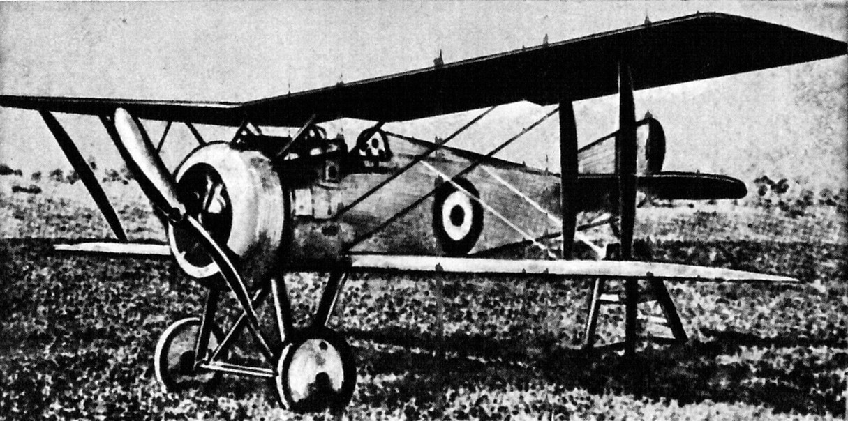 Francuski samolot myśliwski Hanriot HD.1.